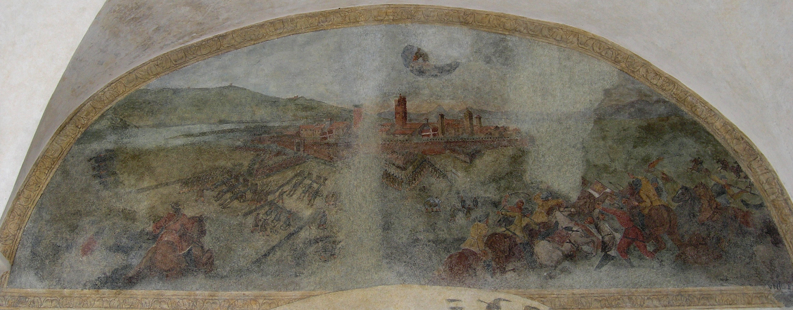 L'affresco, dipinto nel 1709 da pittore ignoto su una delle lunette del chiostro del convento di San Bernardino in Chivasso, è ritornato alla luce durante i lavori di ristrutturazione del complesso tra il 2004 e il 2005.